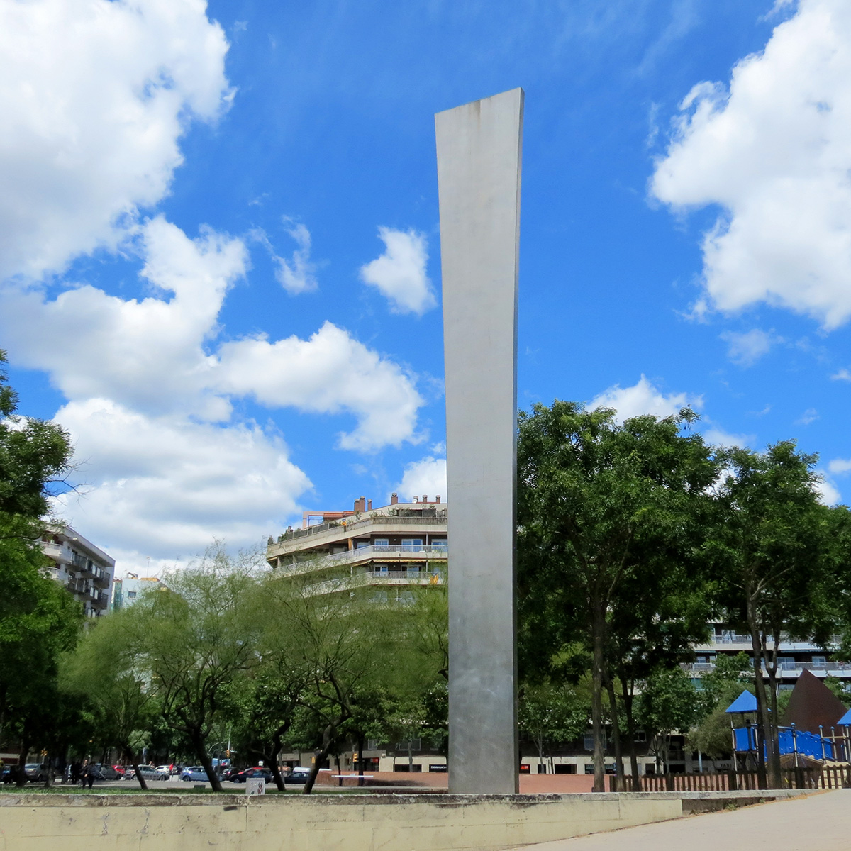 Sense títol (Ellsworth Kelly). Pl. General Moragues (Barcelona)